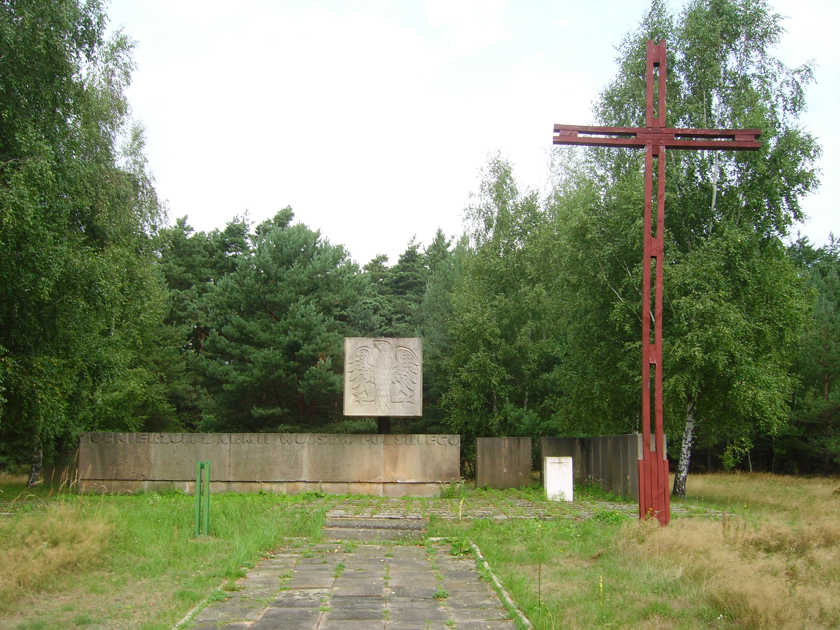 Pomnik Prędocice (Toporów)